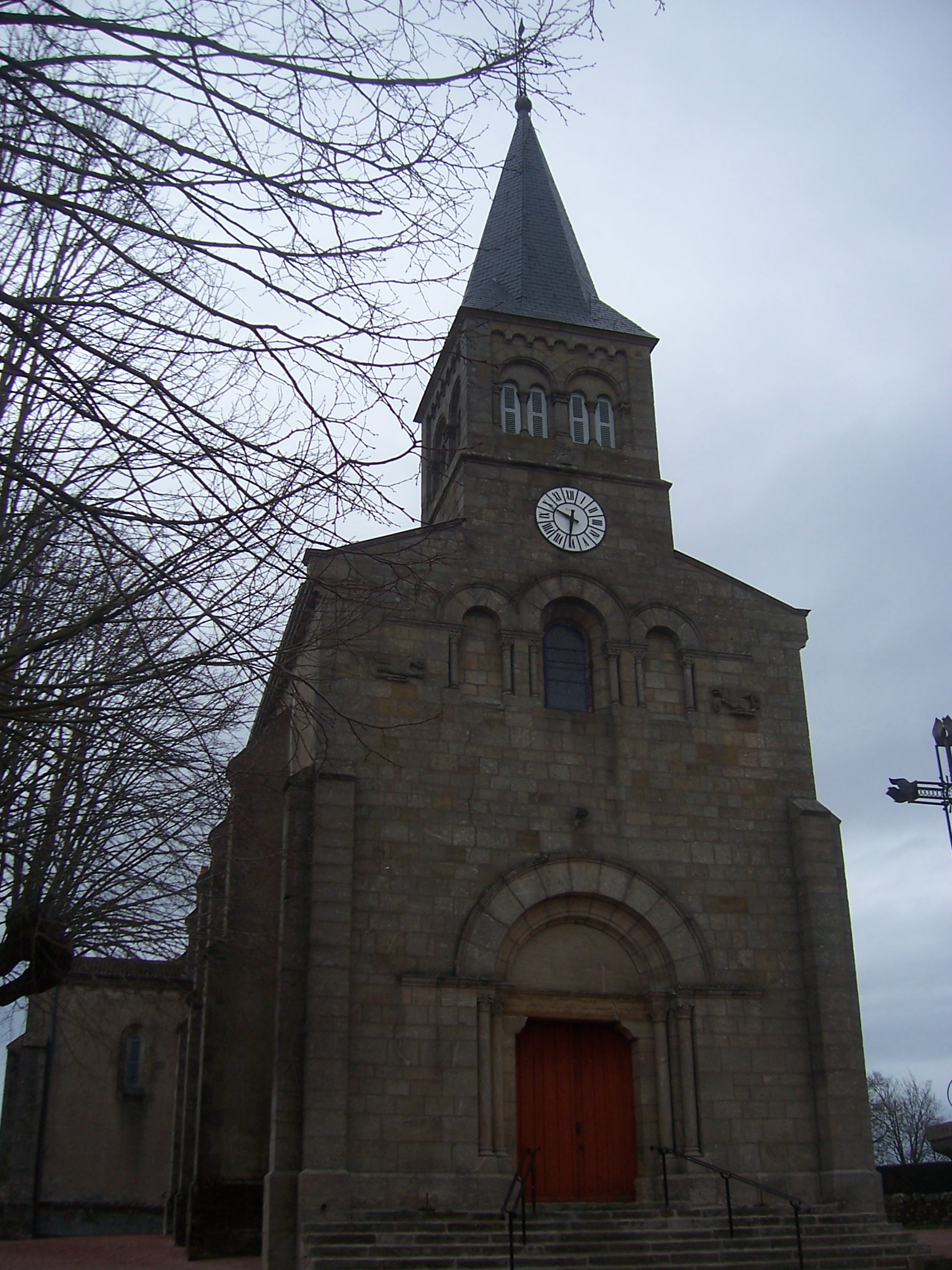 Eglise de Saint-Symphorien-des-Bois